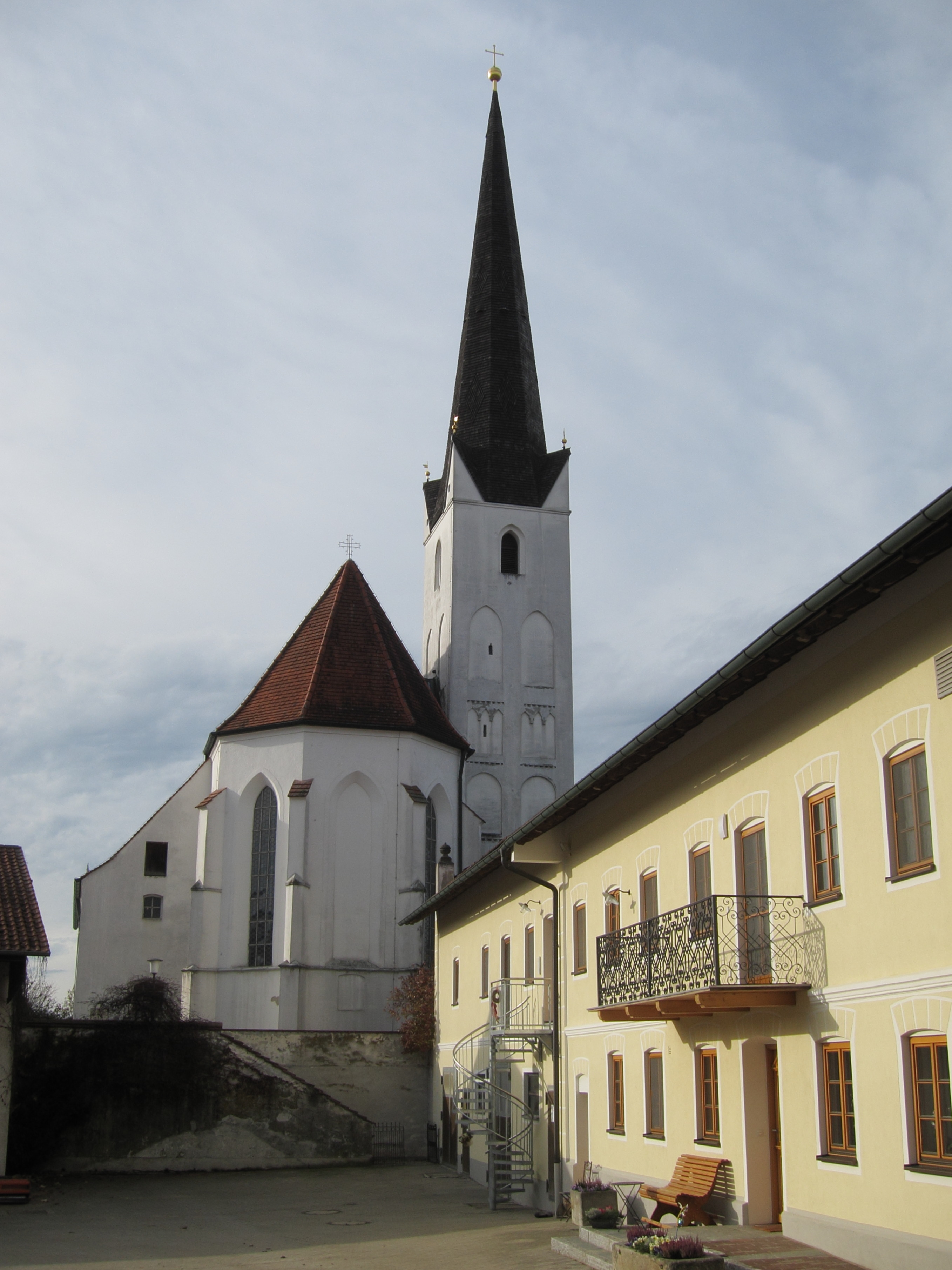 Katholische Filialkirche St. Maria, hochgelegener Saalbau mit eingezogenem polygonalem Chorabschluss, 1484, Chorflankenturm wohl noch Ende 14. Jahrhundert.